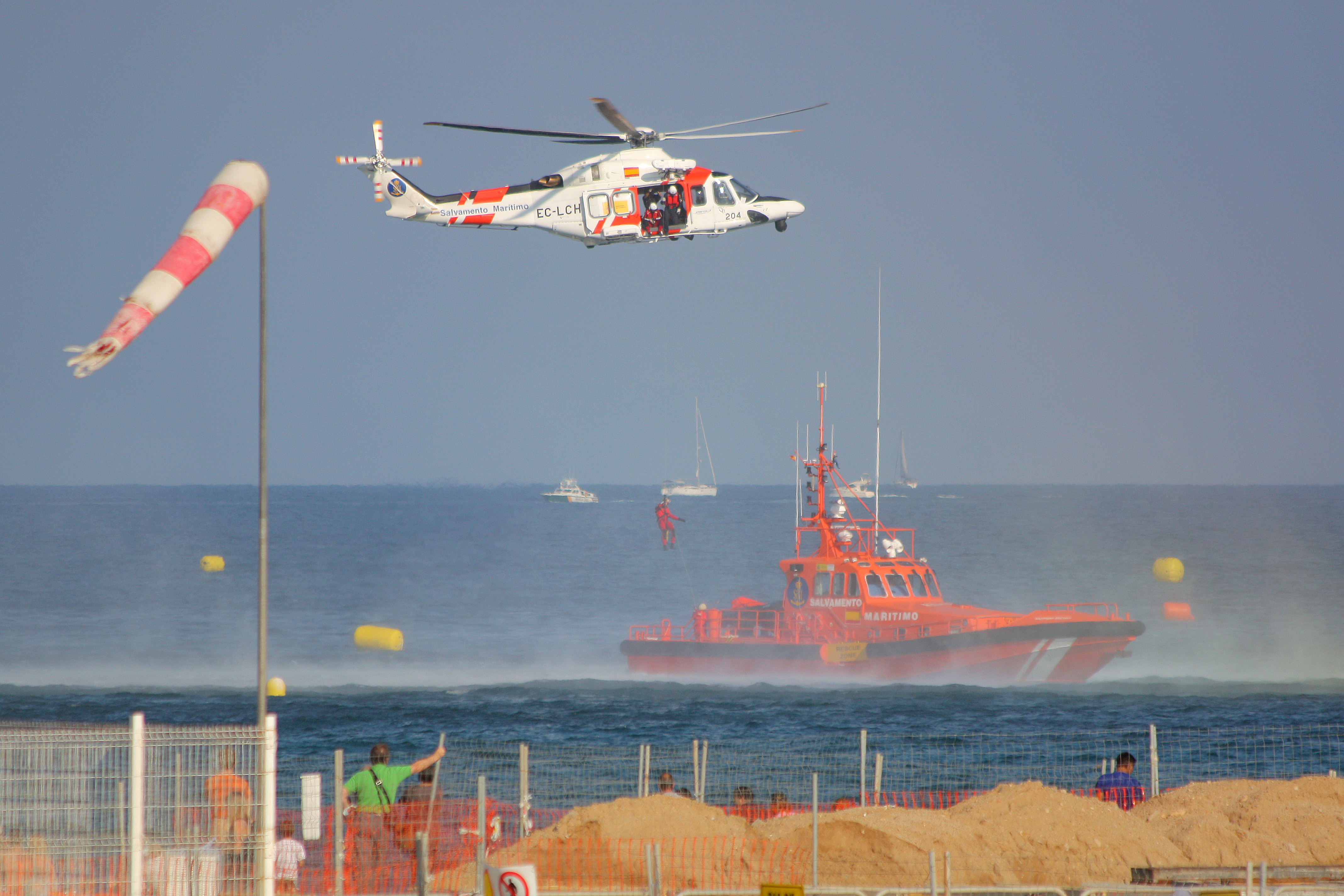 Helimer 203 (Rescue Helicopter)